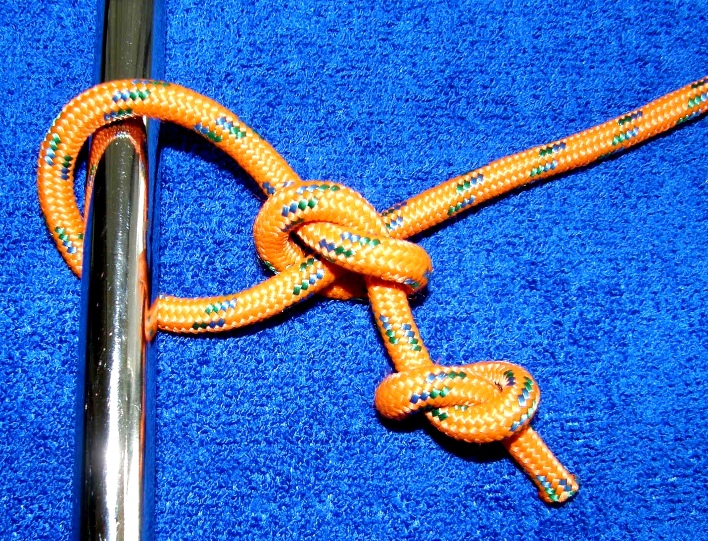 falscher Arborknoten